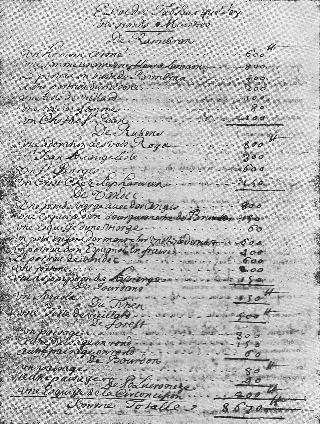 État des tableaux de la collection de Hyacinthe Rigaud en 1703